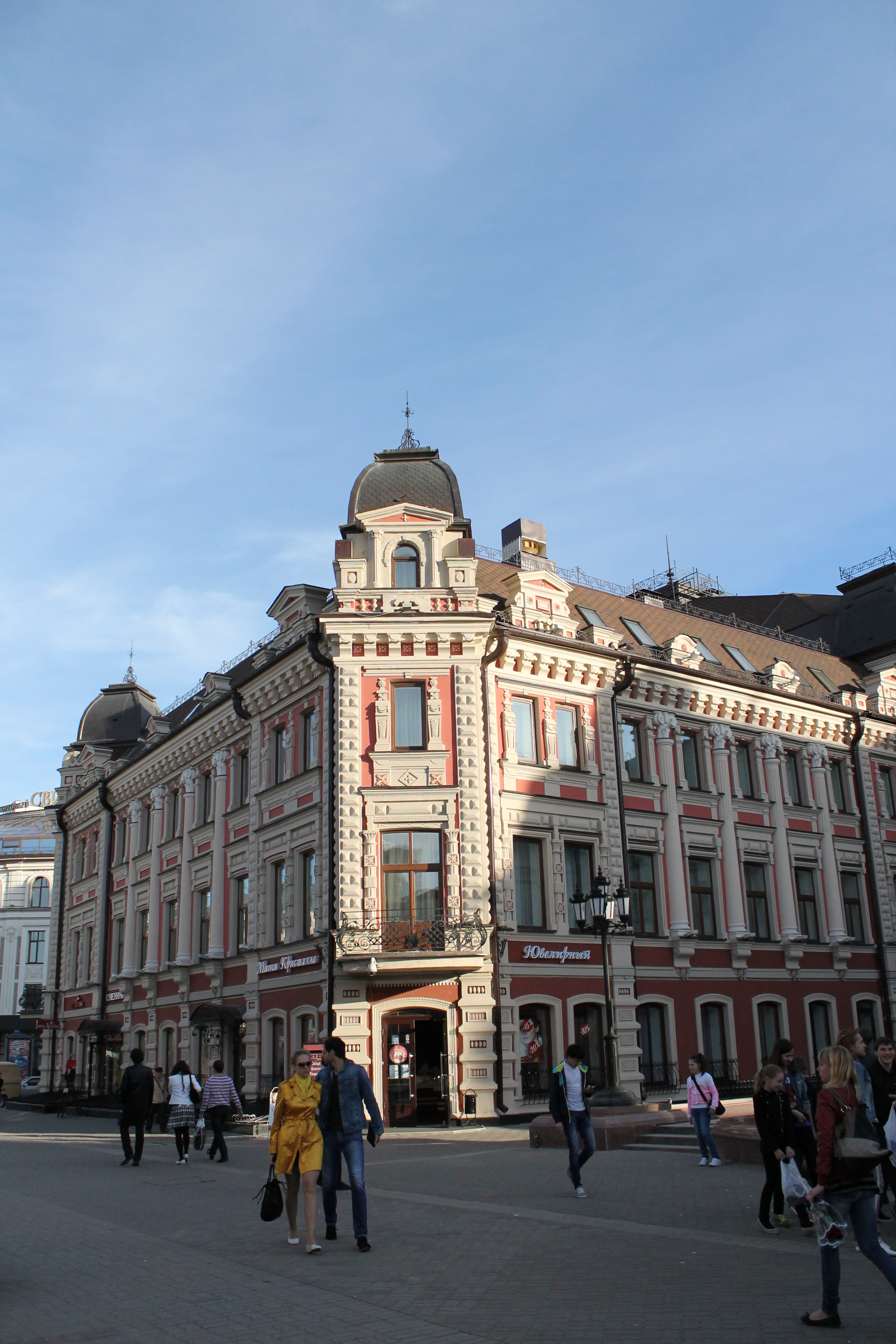 Дом смоленцева (Республика Татарстан, Казань, университетская улица, 7)